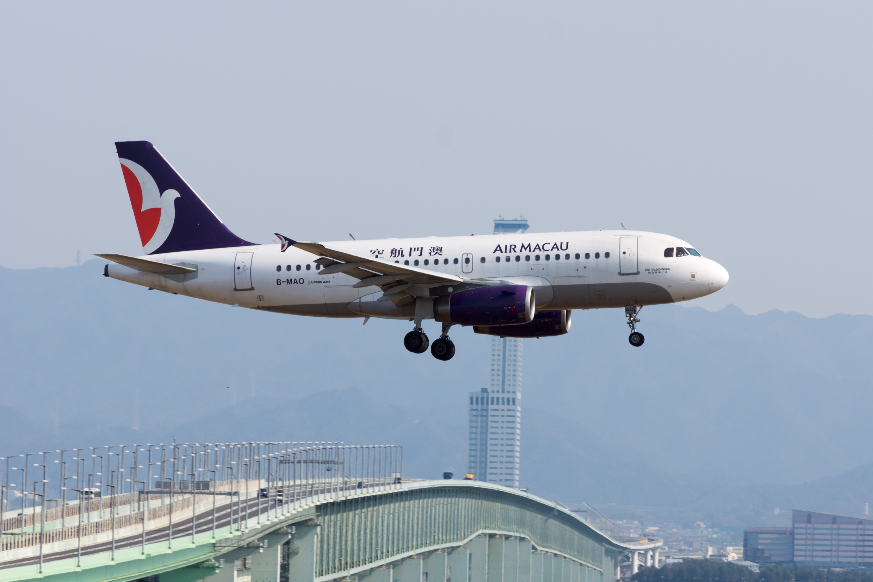 Air Macau Airbus A319-132